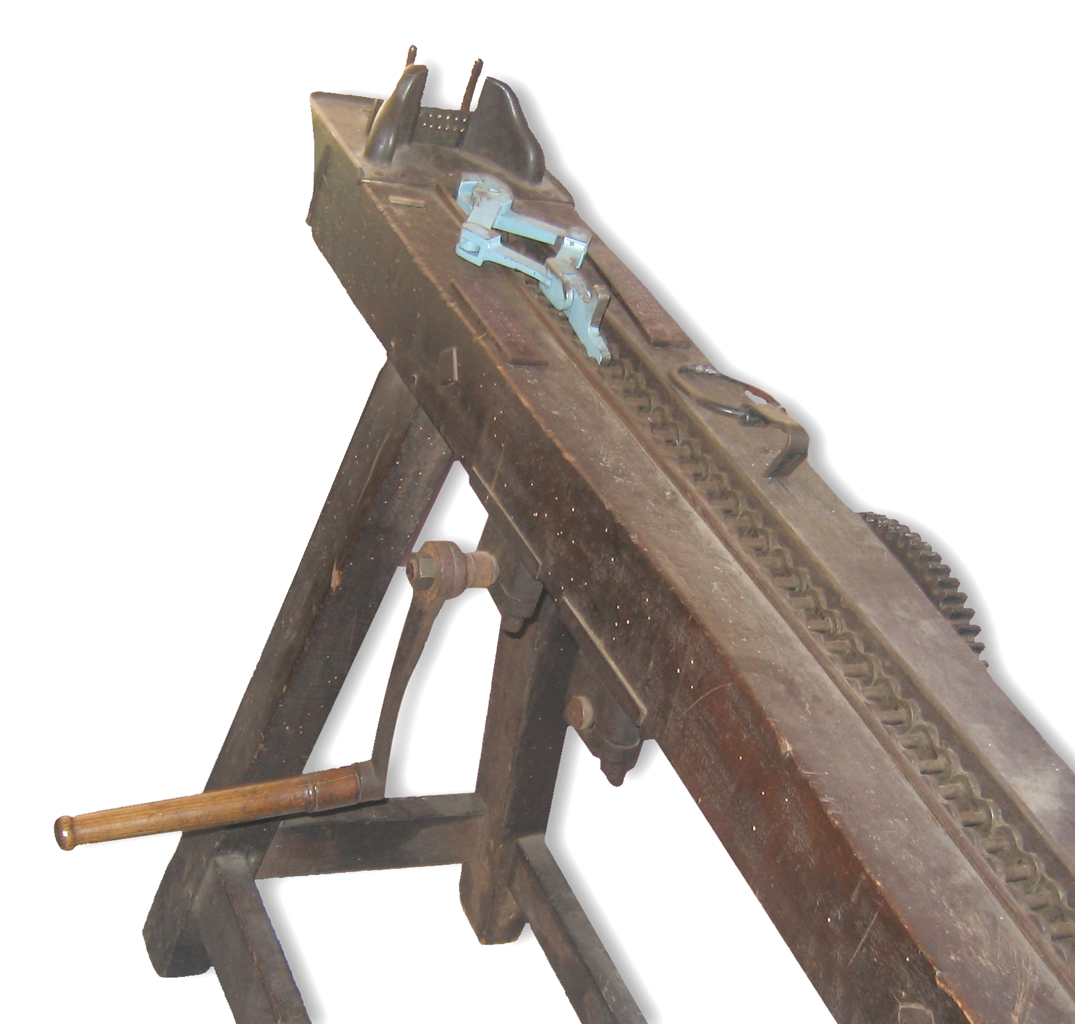 Banc à étirer, outil de bijoutier source : l'Or de Vaise / photo : Dominique grassigli